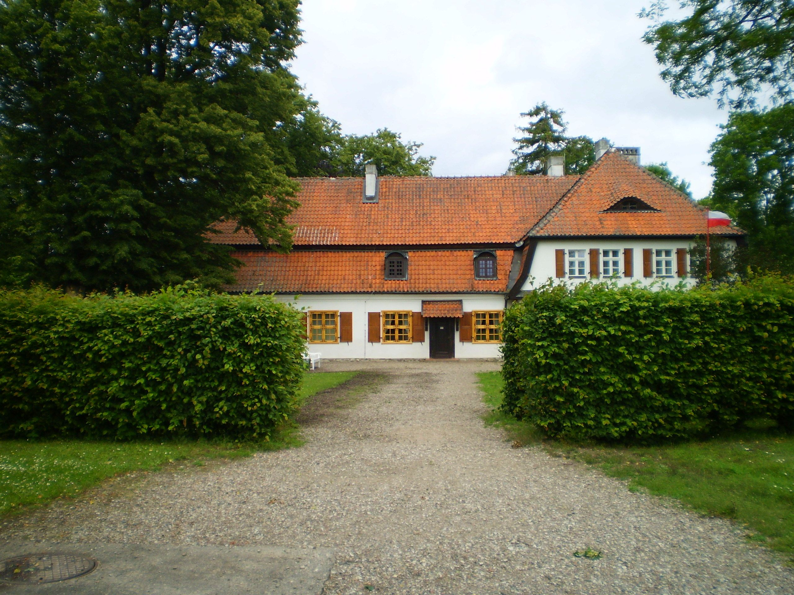 Dwór Józefa Wybickiego w Będominie